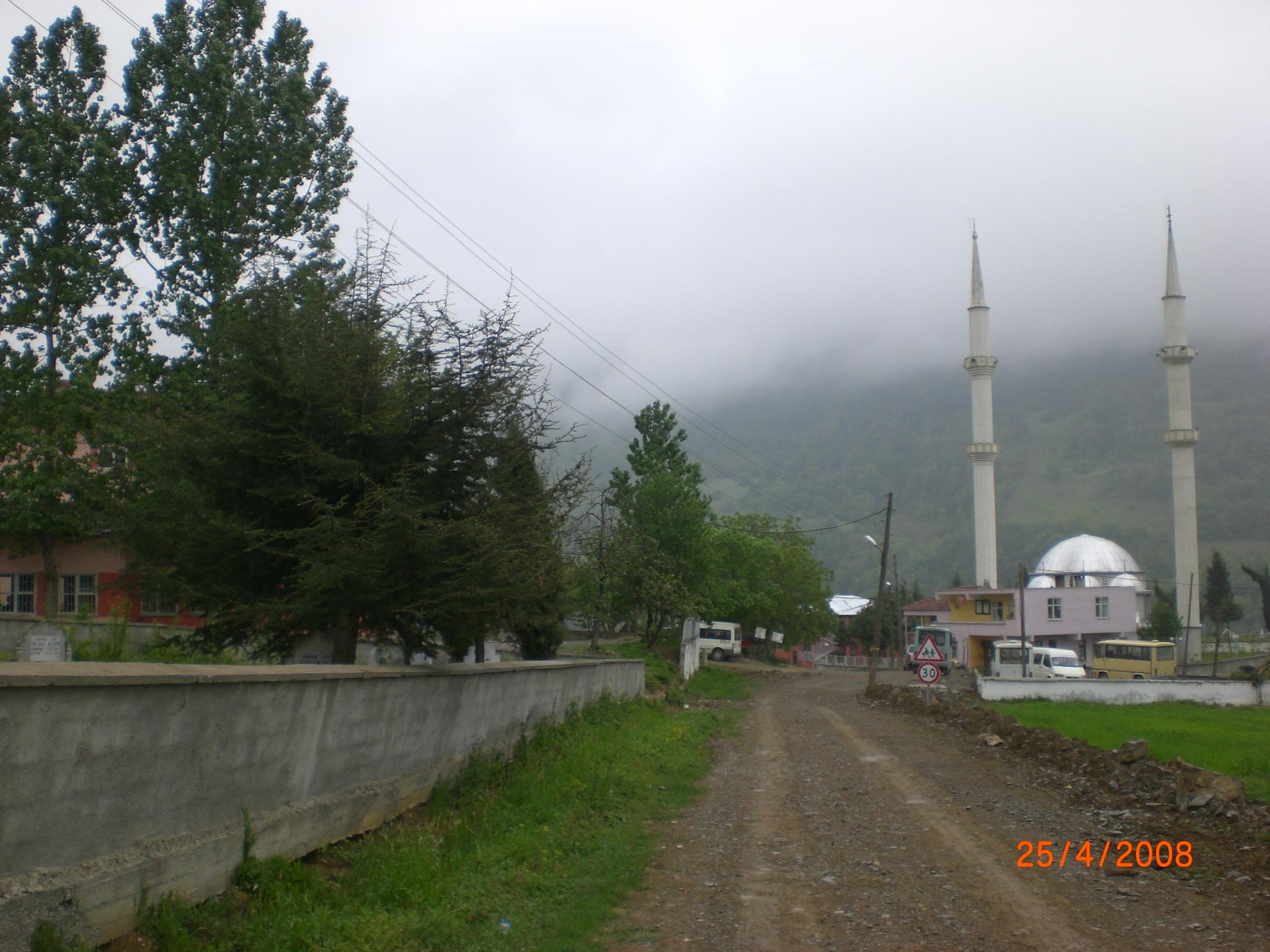 Kişisel Çekim... -ragkara